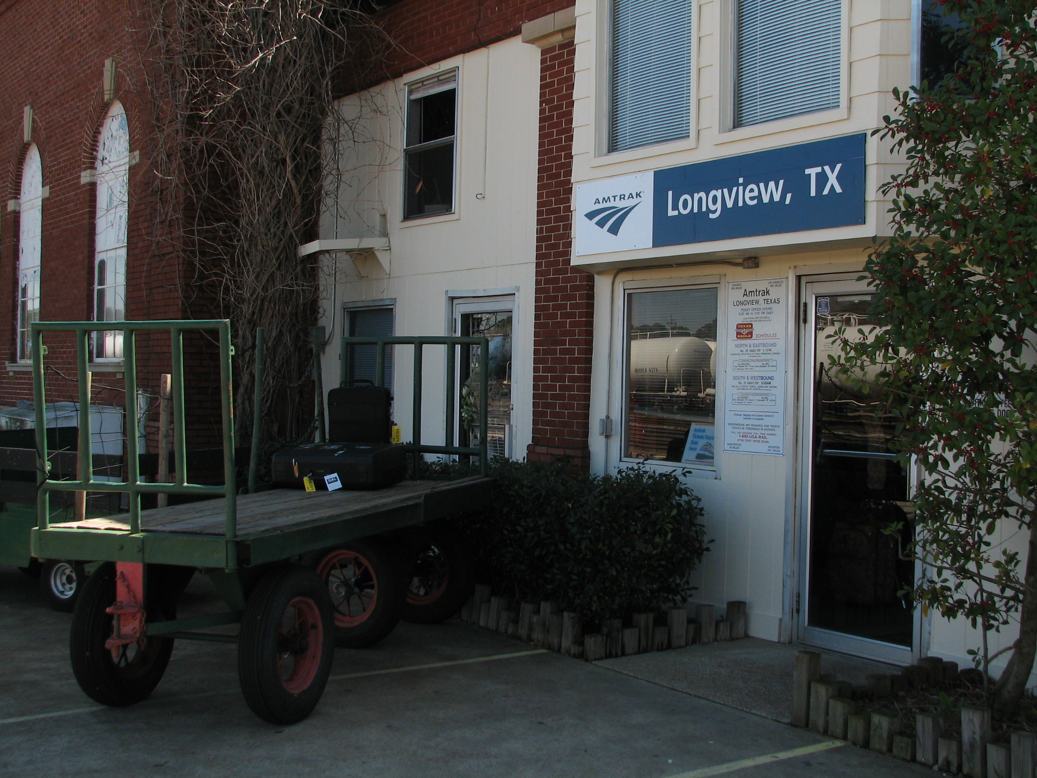 Longview, TX passenger terminal